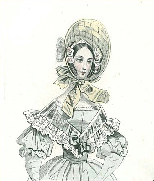 Oryginalny opis z magazynu: Kapotka watowana atłasowa, ozdobiona piórami, pod kapotką róże gazowane. Suknia z renversem, blondyną obszytym.